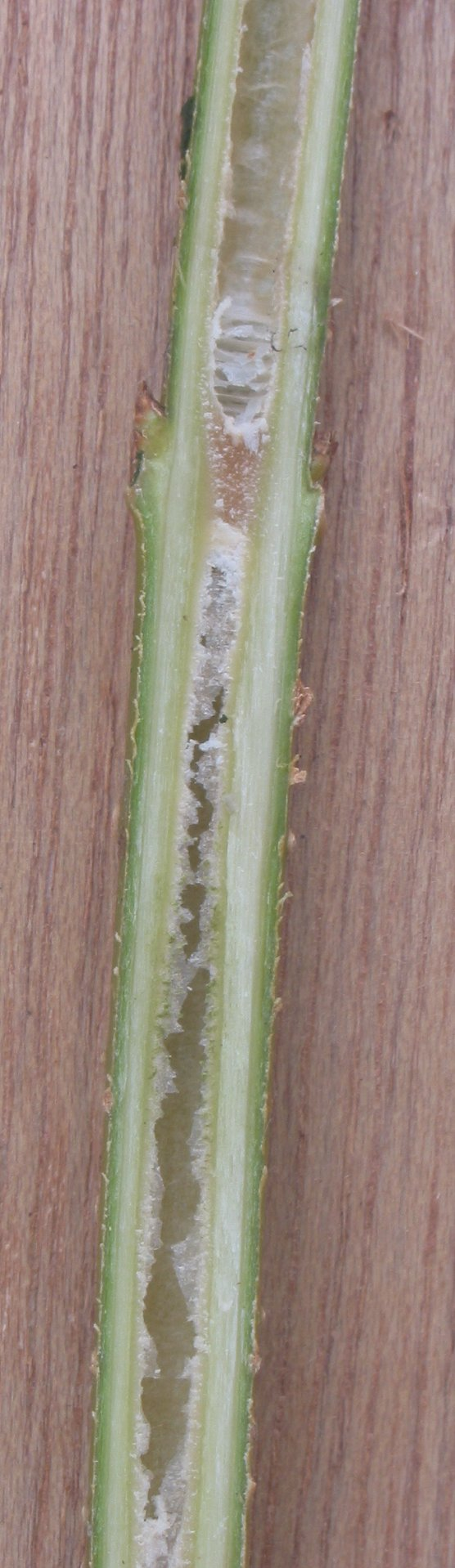 zelfgemaakte foto van lengtedoorsnede van een tak van Forsythia; eind november